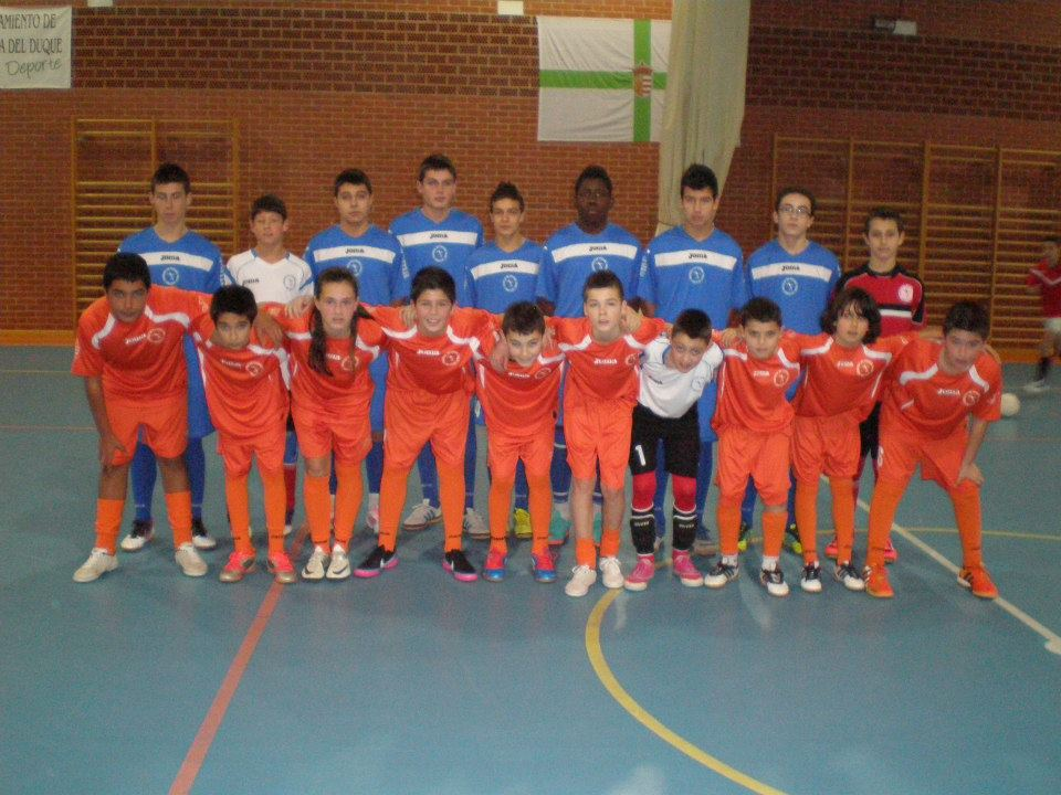 Equipos del Fair Play de Herrera